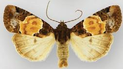 Bryolymnia biformata male